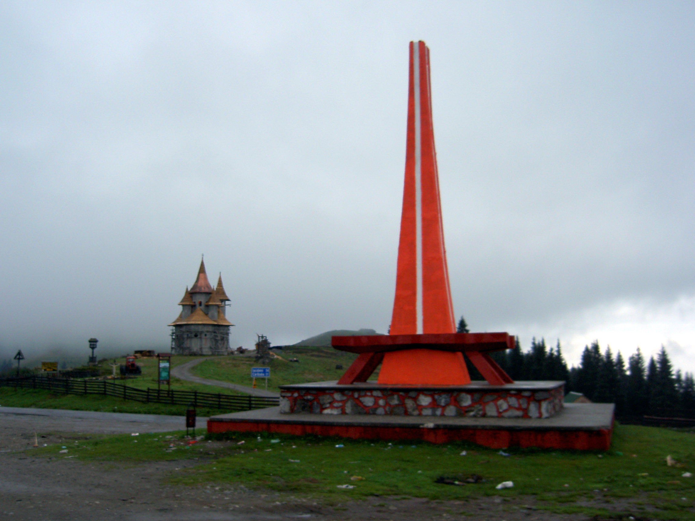 Sedlo Prislop